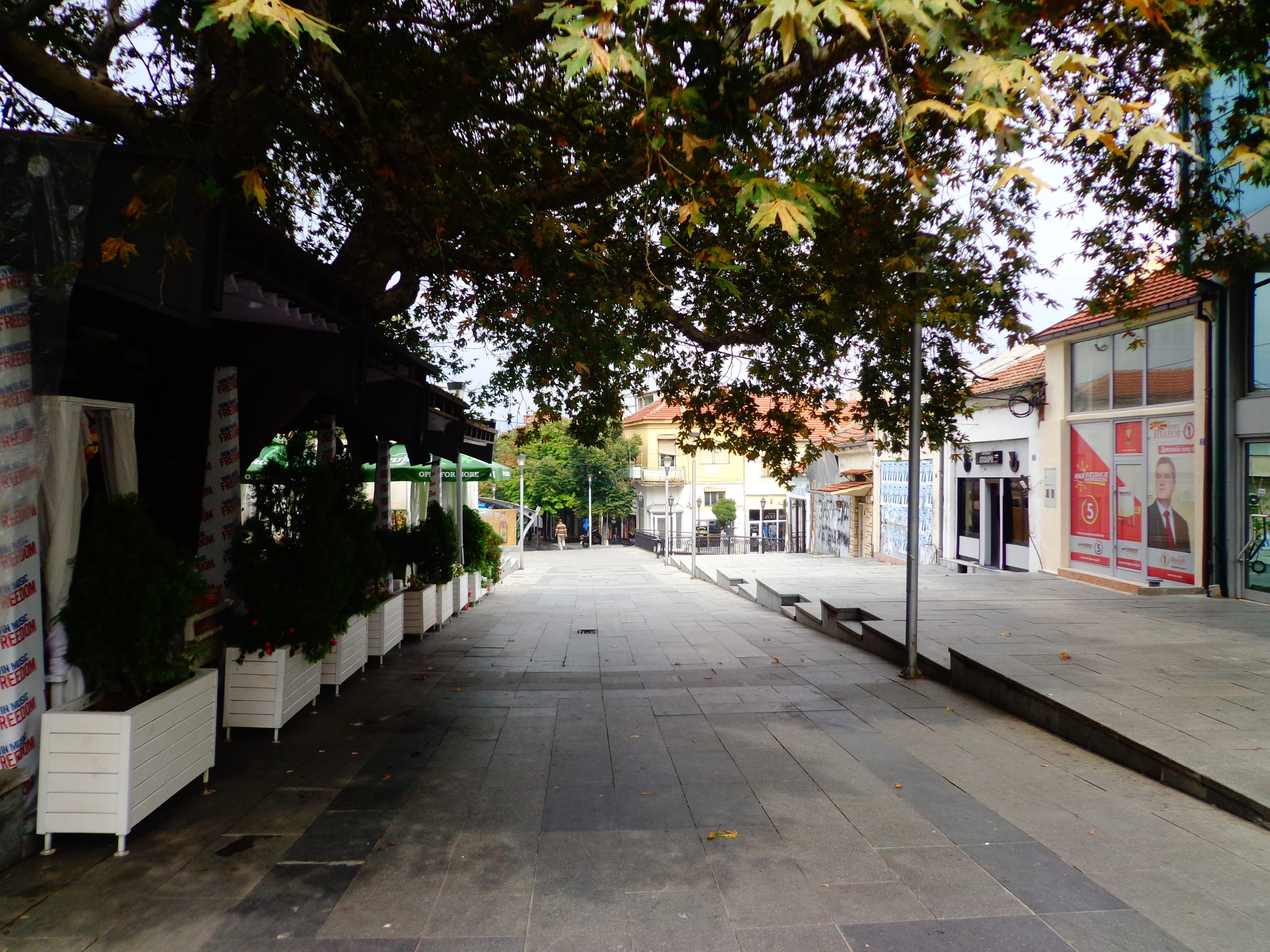 Струмица - Р. Македонија , Strumica - R. of Macedonia